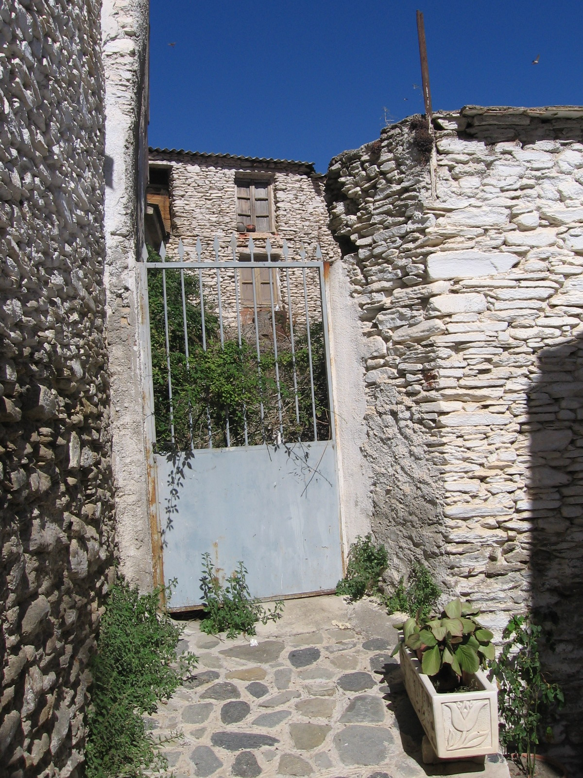 Casa típica, Bacares, España.